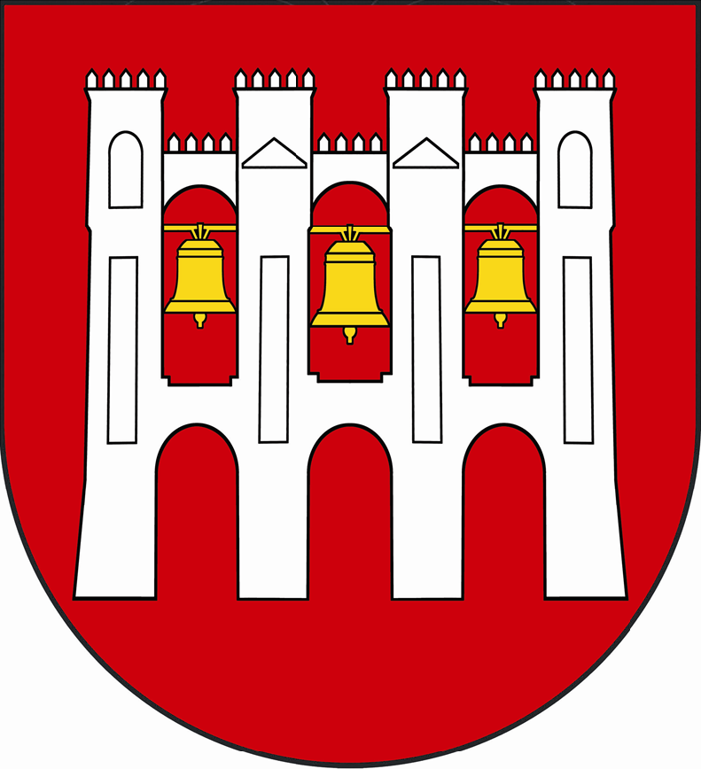 Herb gminy Rutki